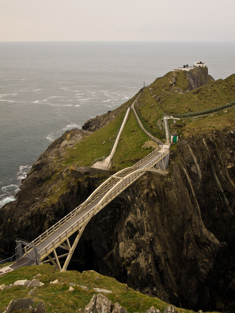 Bridge, Mizen Head 2012